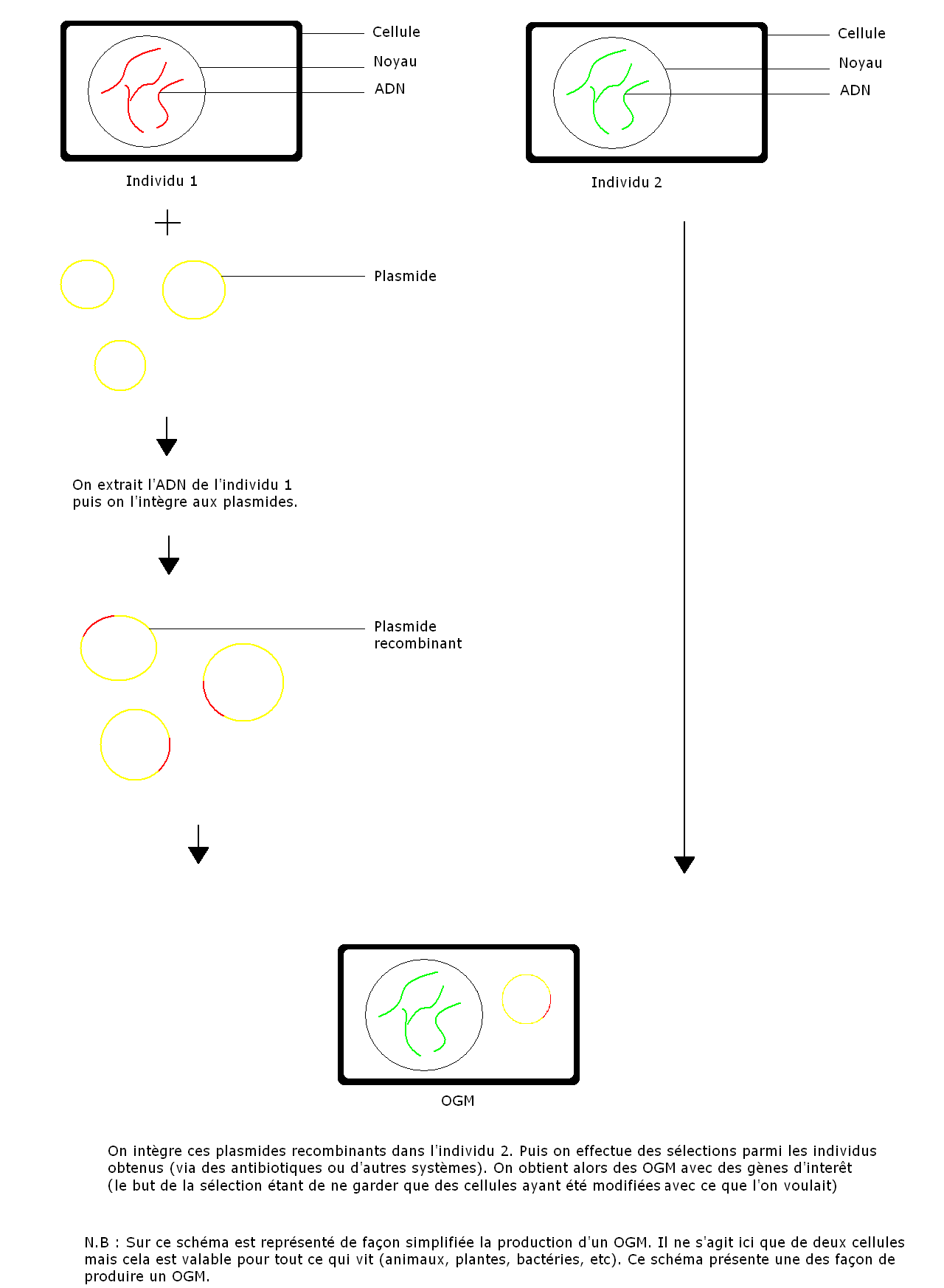 Schema de production d'un OGM